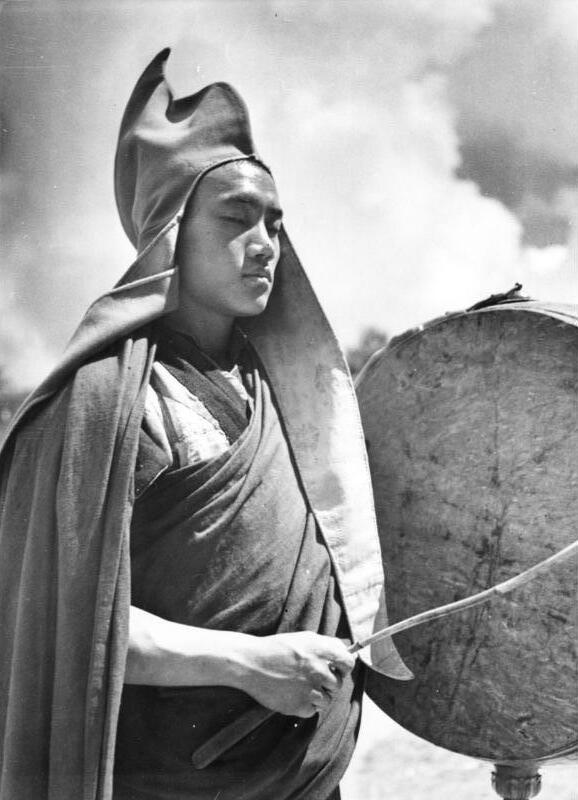 Tibetexpedition, Mönch mit Schlaginstrument Gangtok, Stielpauke [Schlaginstrument, Musik]